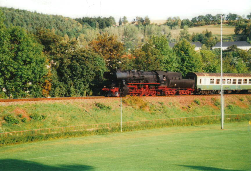 52 8075 bei Berga/Elster während einer Sonderfahrt auf der Elstertalbahn (2000).